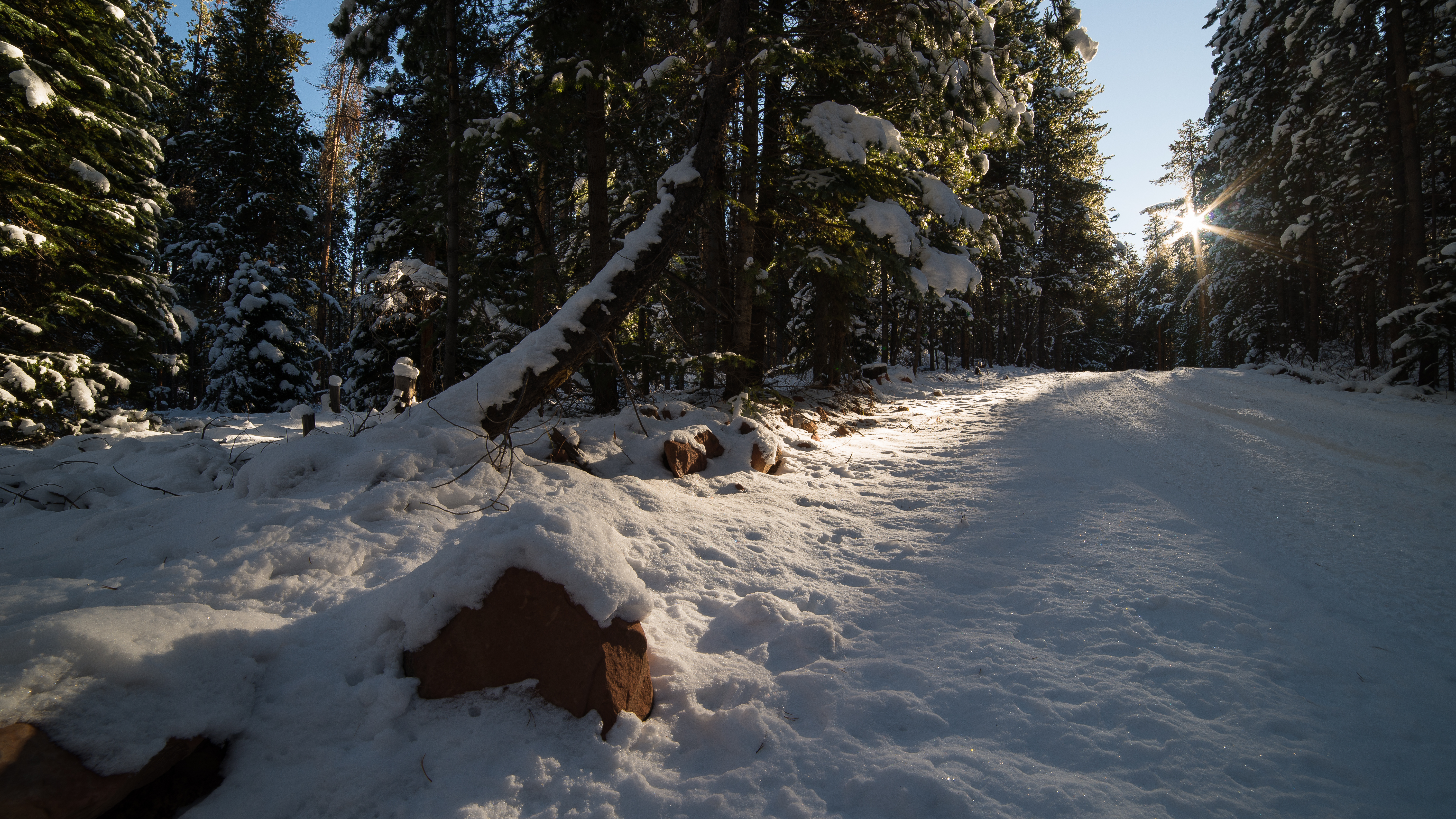 Sylvan Lake State Park, November 2015